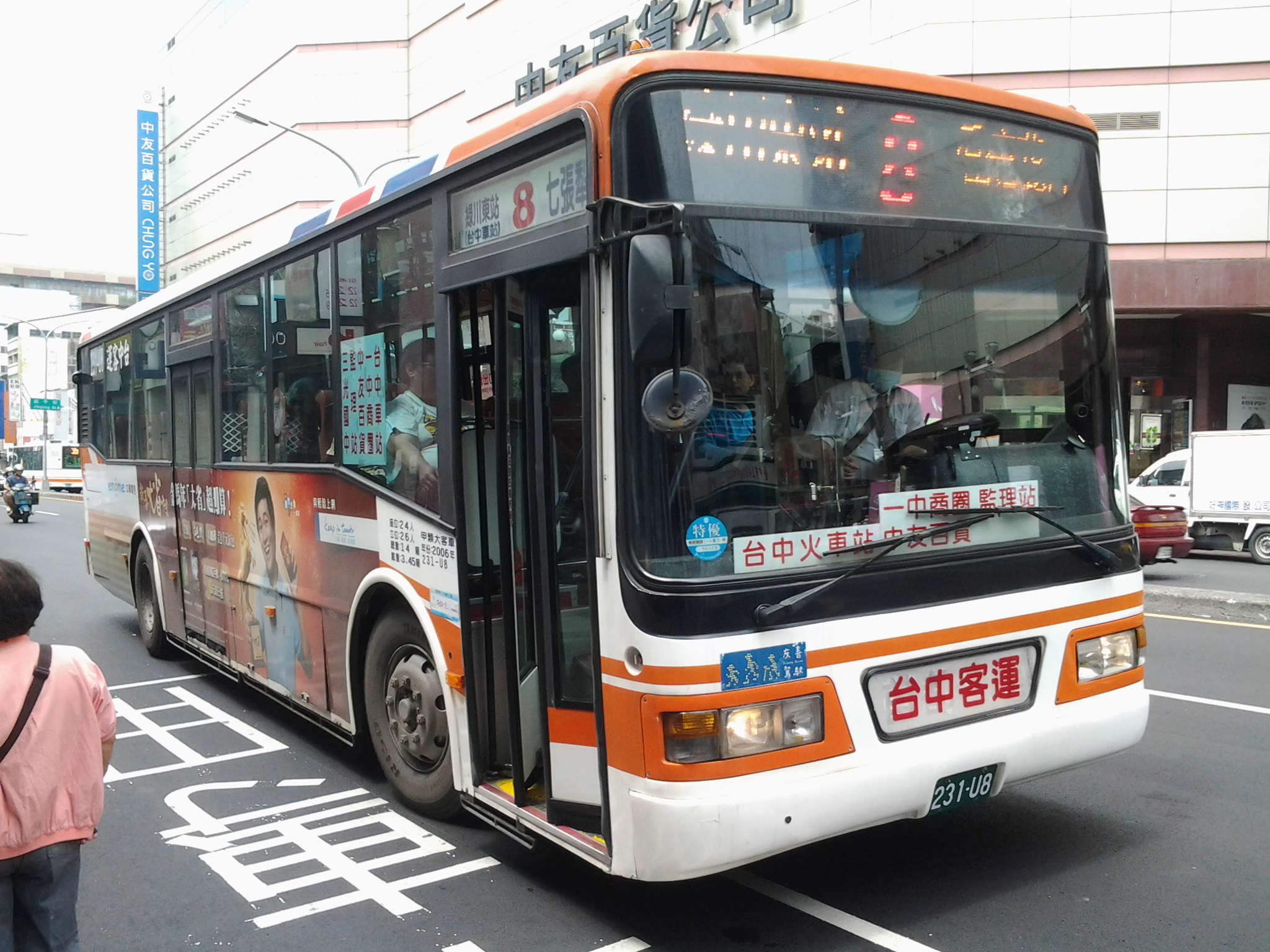 2006〈2014〉 HINO ERK2JRL（固特）